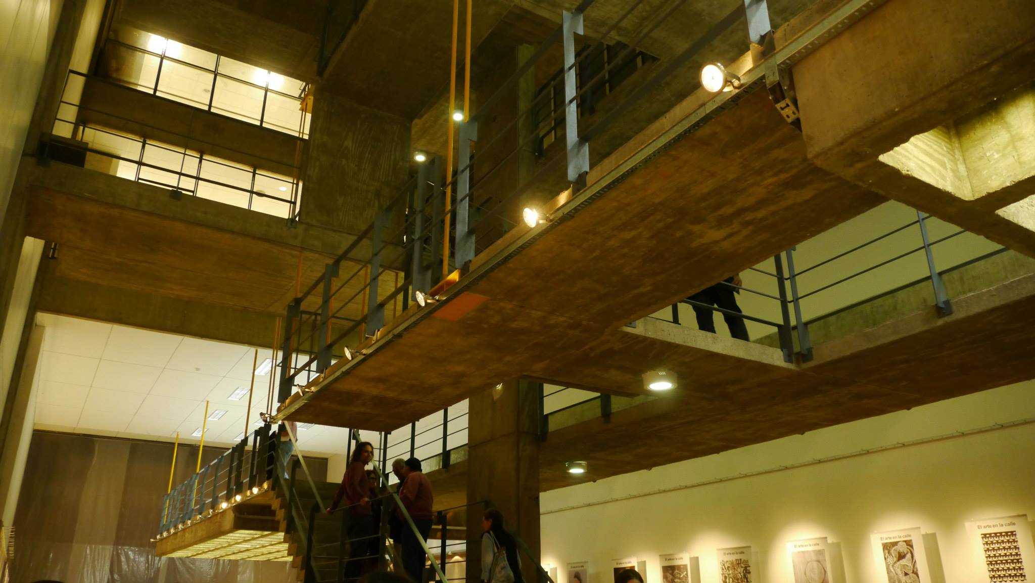 Facultad de Humanidades y Artes (pasillo)